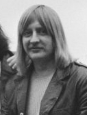 Theo Klouwer, drummer van The Cats